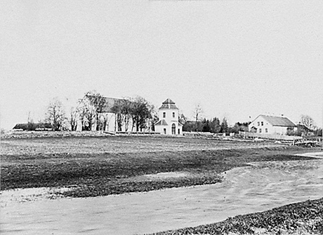 Rapla mõis (Rappel), vana kirik lammutatud 1899, paremal kirikla. Rapla khk, ERM Fk 887:344, Eesti Rahva Muuseum